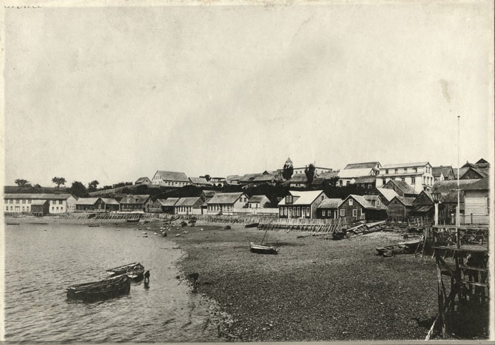 Vista de la ciudad de Calbuco, 1915.